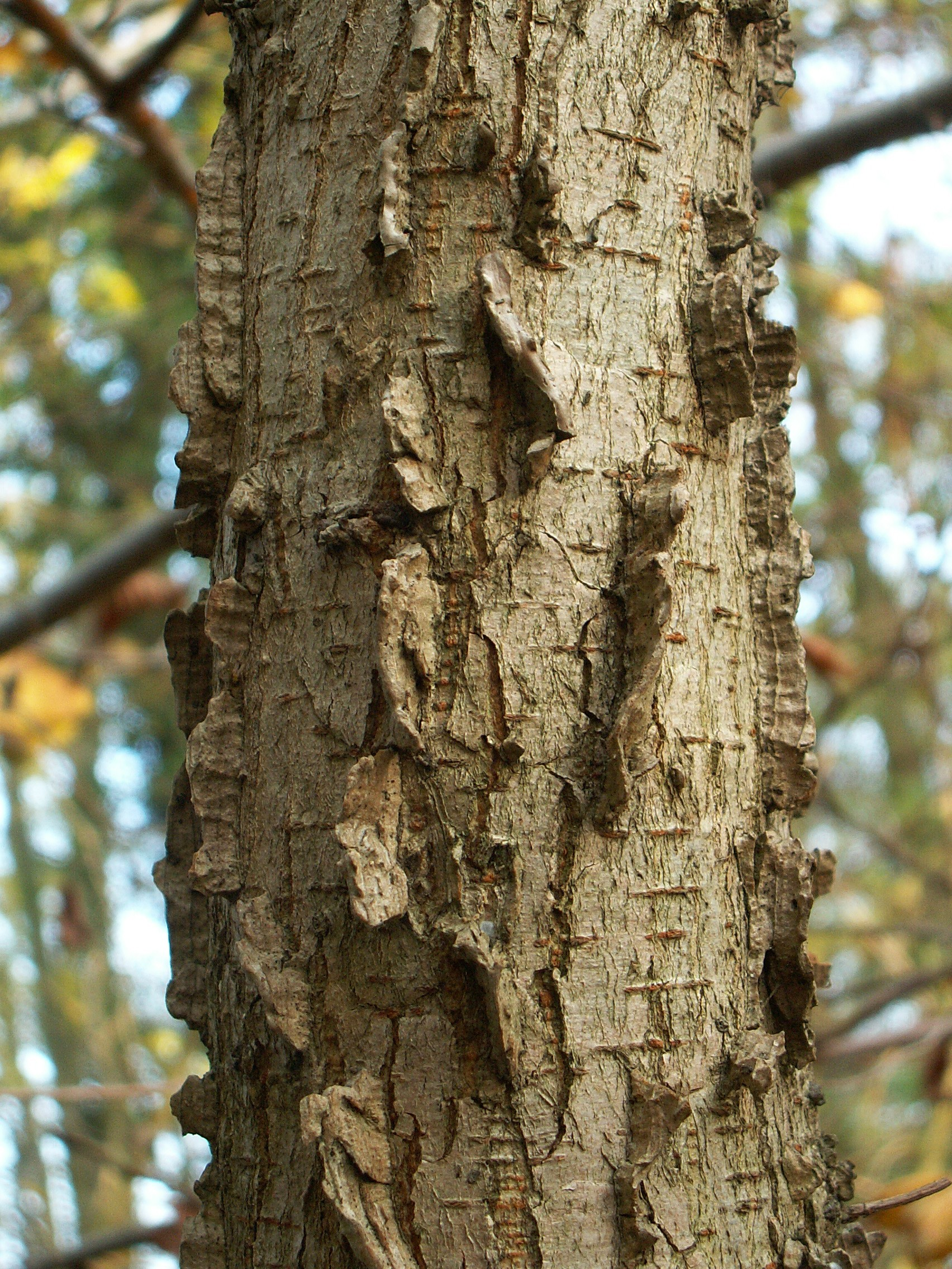 Ulmus minor suberosa, bark. Kamień Pomorski, NW Poland